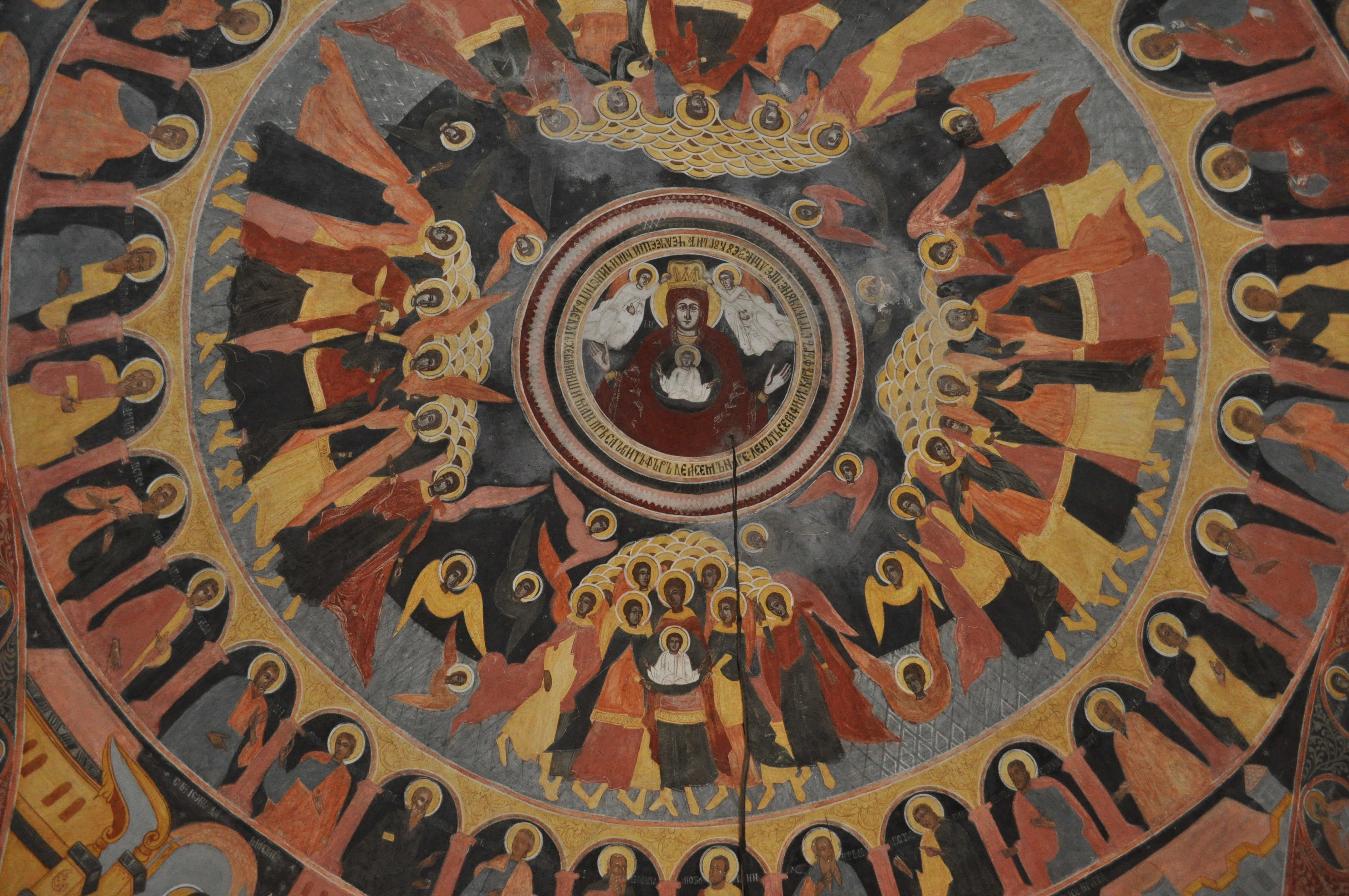 Biserica "Naşterea Domnului" , sat SĂRATA; comuna PORUMBACU DE JOS; boltă - Soborul Maicii Domnului